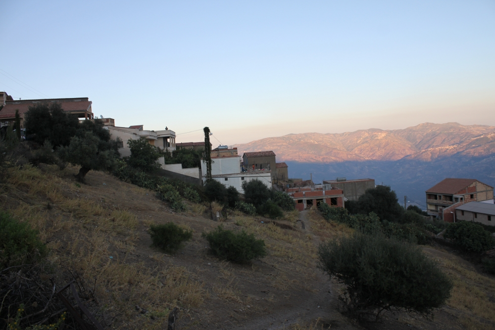 Photo du village Tasga dans la commune de Souk-Oufella (Béjaïa, Algérie)